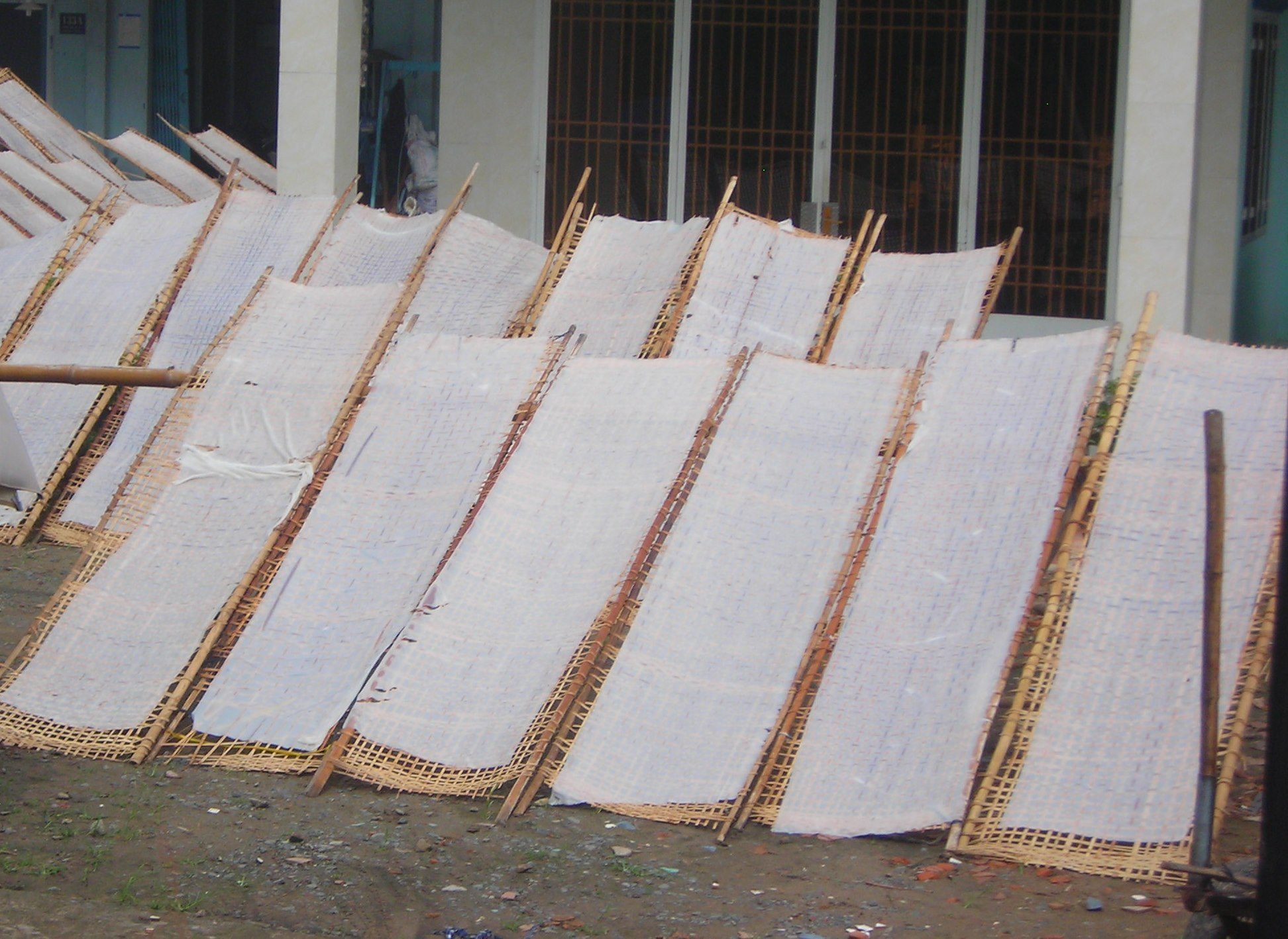 Galettes de riz rectangulaires, séchées au soleil